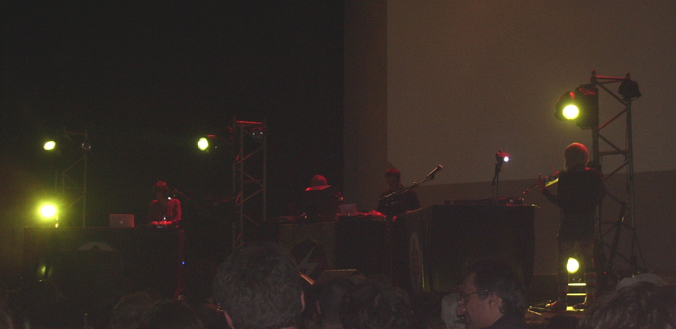 TG